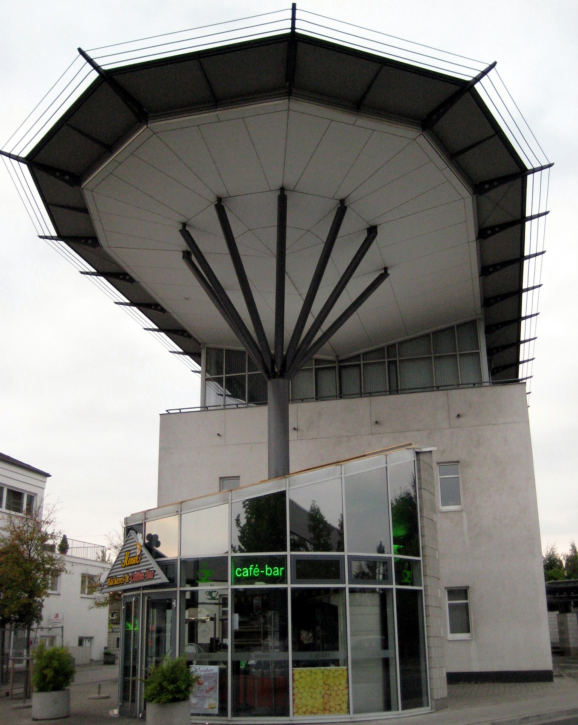 Ärztehaus in in Bünde, Kreis Herford, Nordrhein-Westfalen.